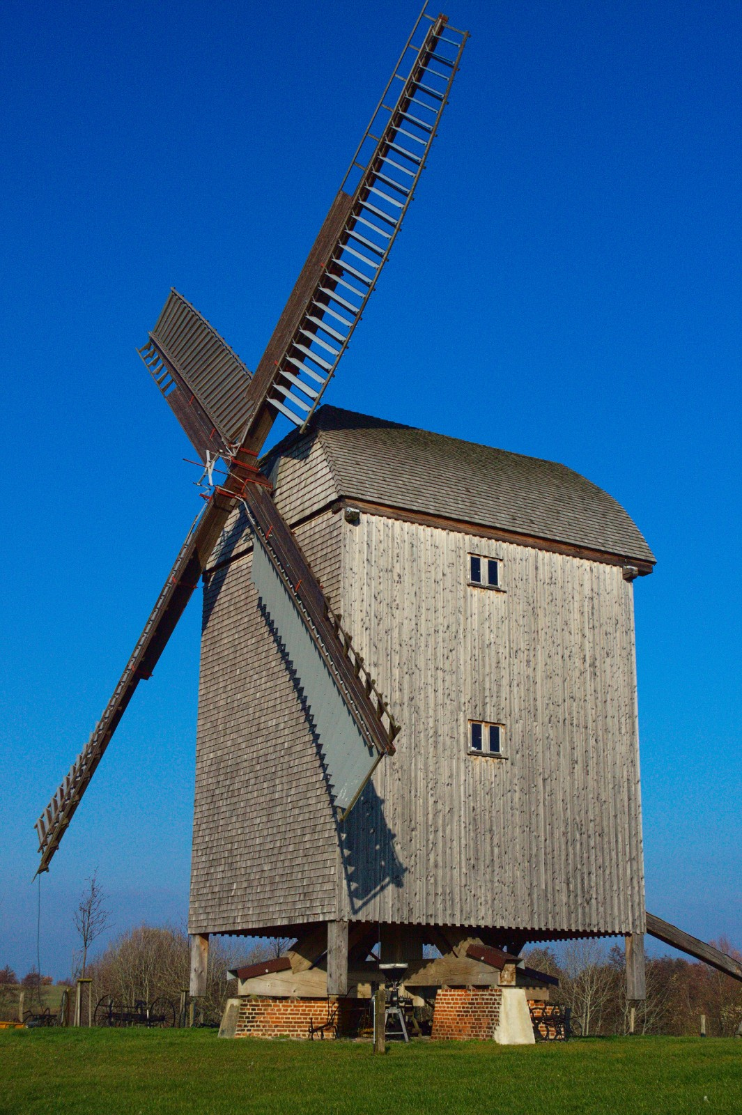 Windmühle